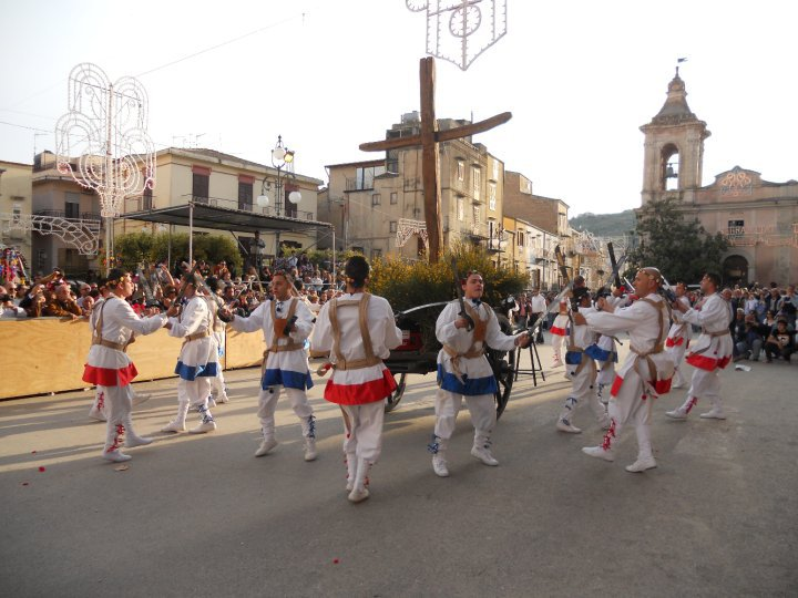 Croce paleocristiana di Casteltermini e il gruppo del tataratà